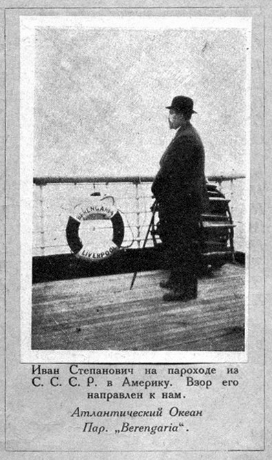 Лидер евангельских христиан СССР Иван Степанович Проханов едет из СССР в длительную командировку в США